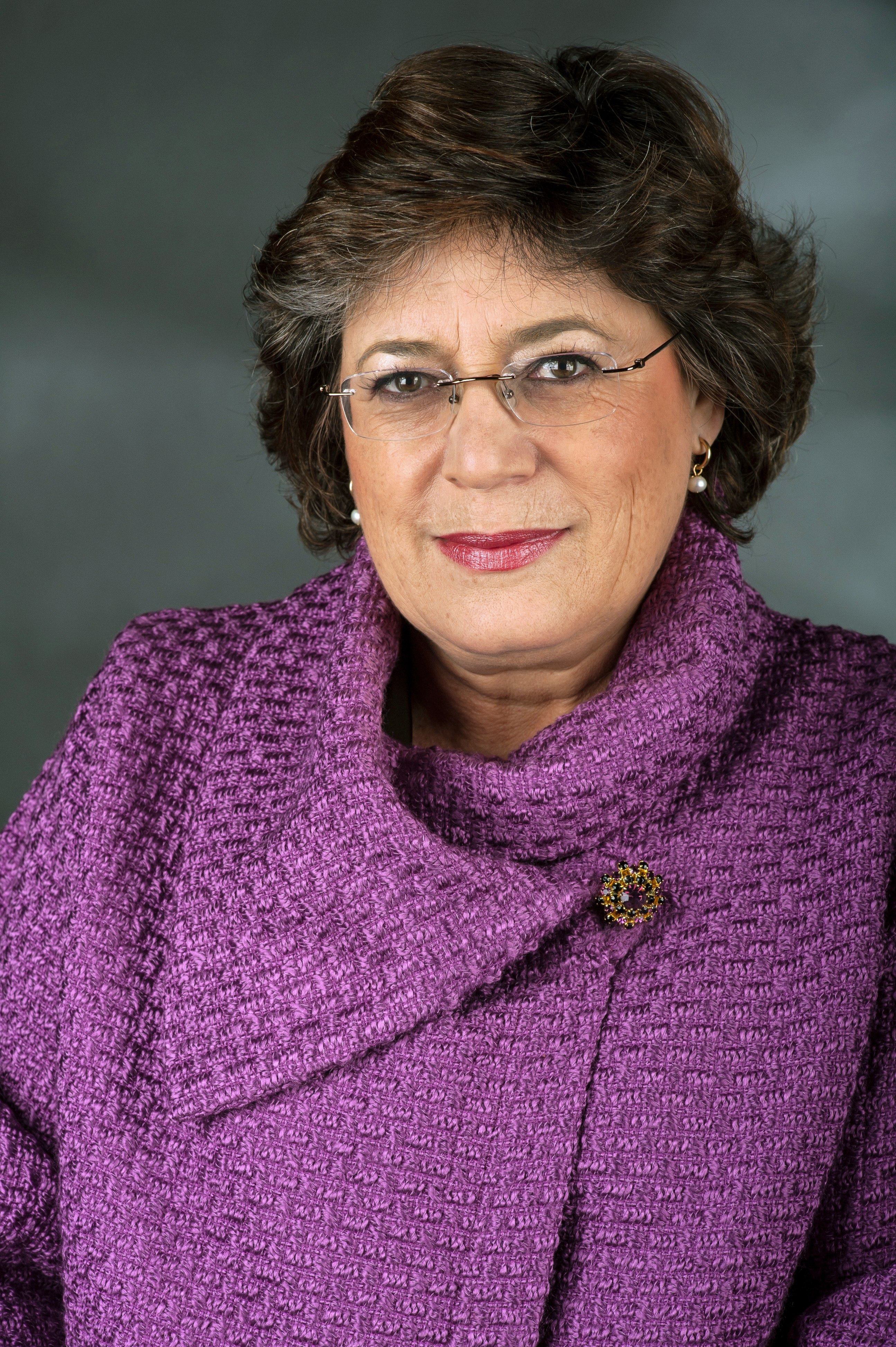 Ana Gomes